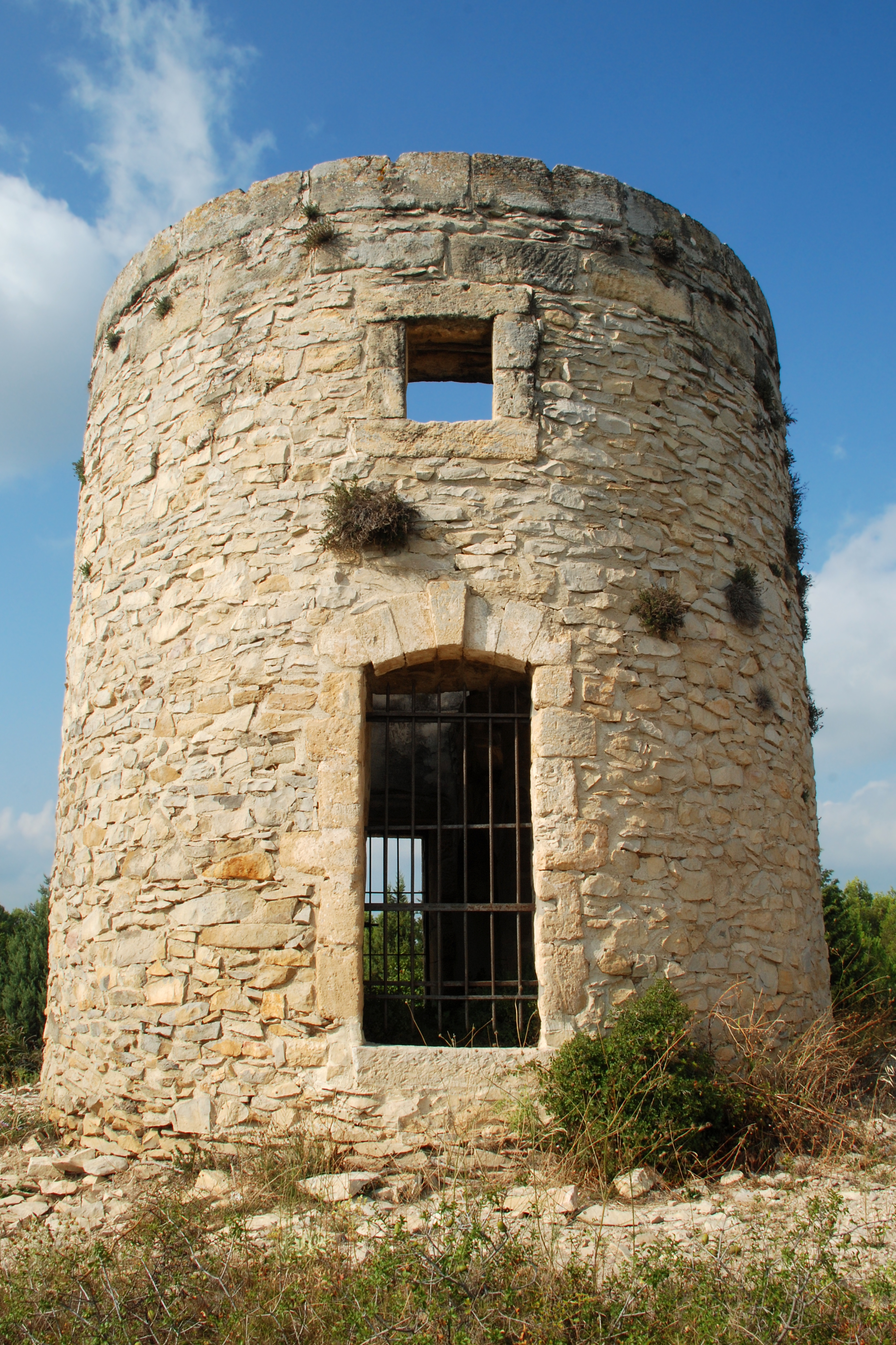 France - Gard - Calvisson - Roc de Gachone